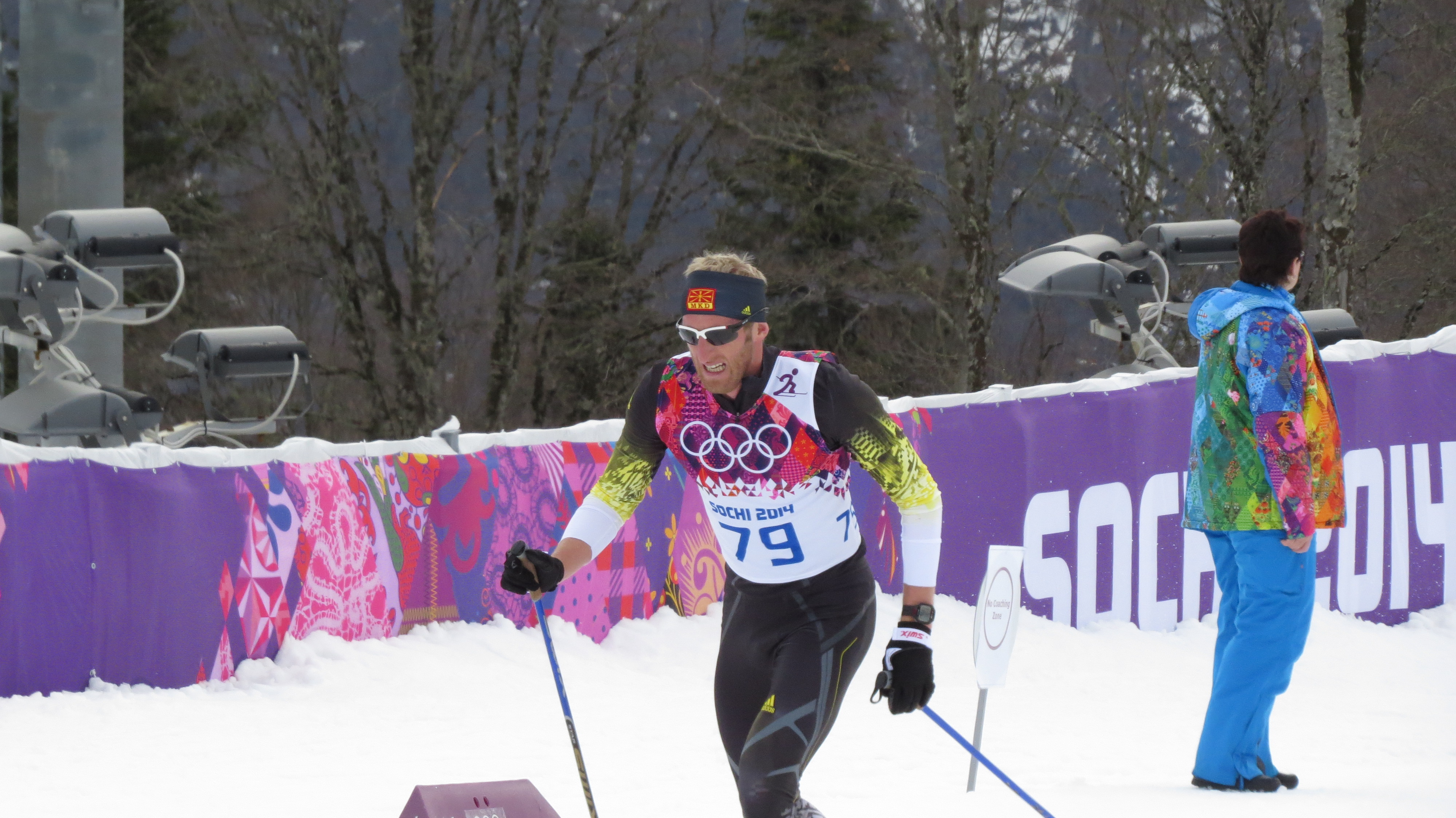 Лыжные гонки на зимних Олимпийских играх 2014 — 15 км классическим стилем (мужчины)